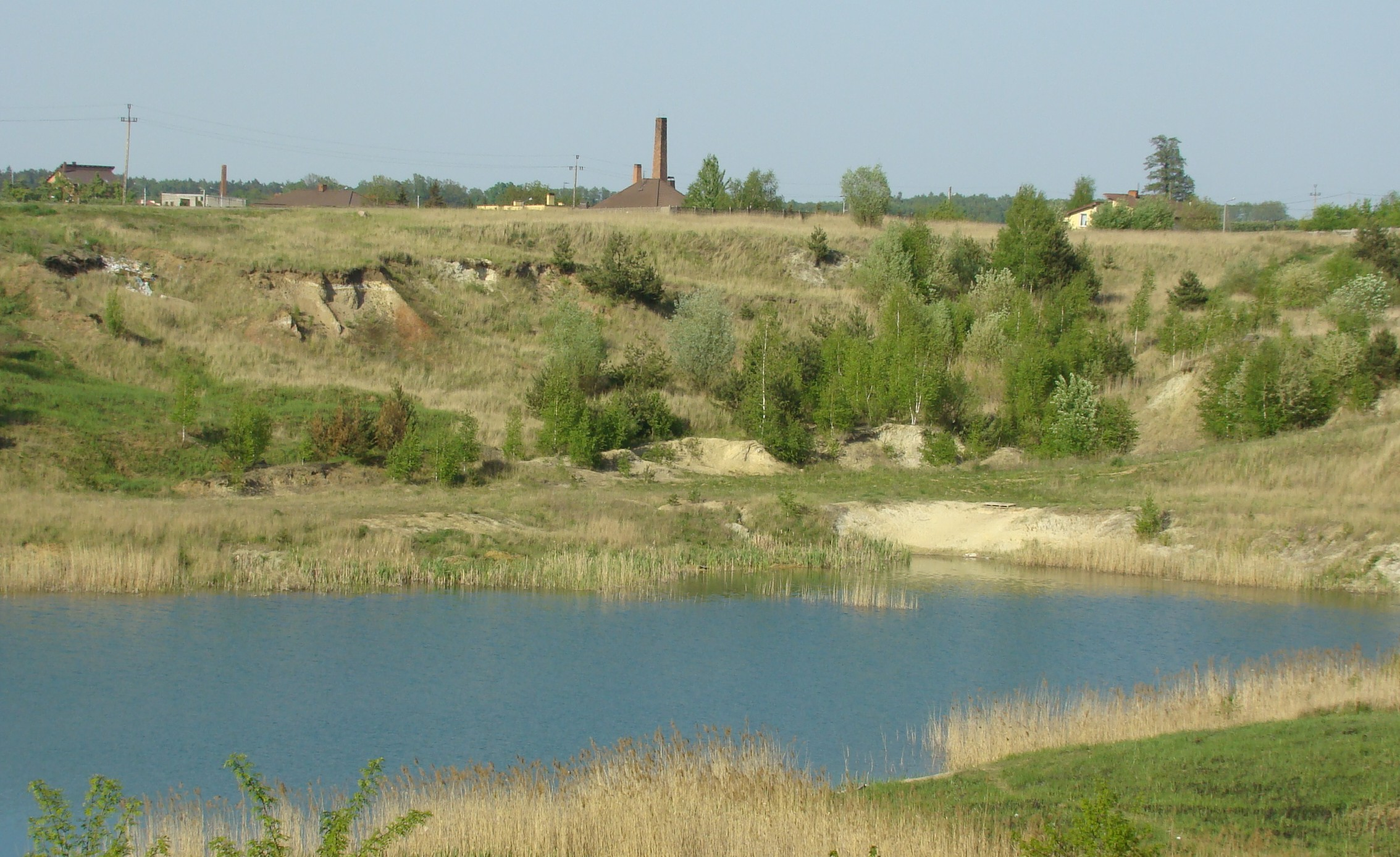 BYŁA przed laty CEGIELNIA kopalnia gliny Sieradzka Piaszczysta 6